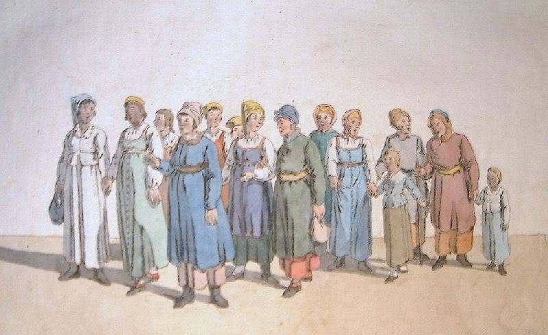 Невеста по дороге в баню (Шествие женщин, некоторые из которых держат друг друга за руки).